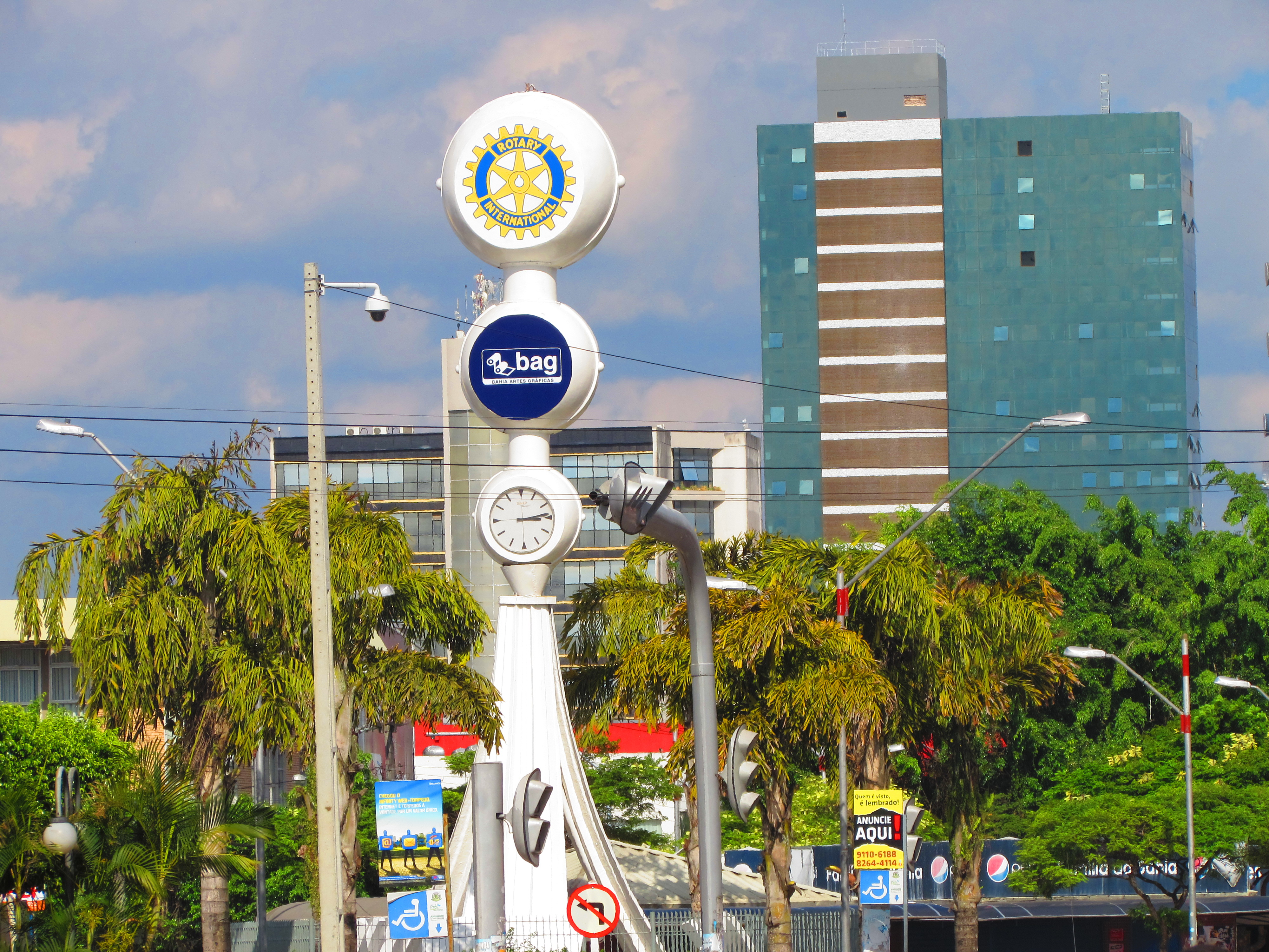 Relogio Rotary em Feira